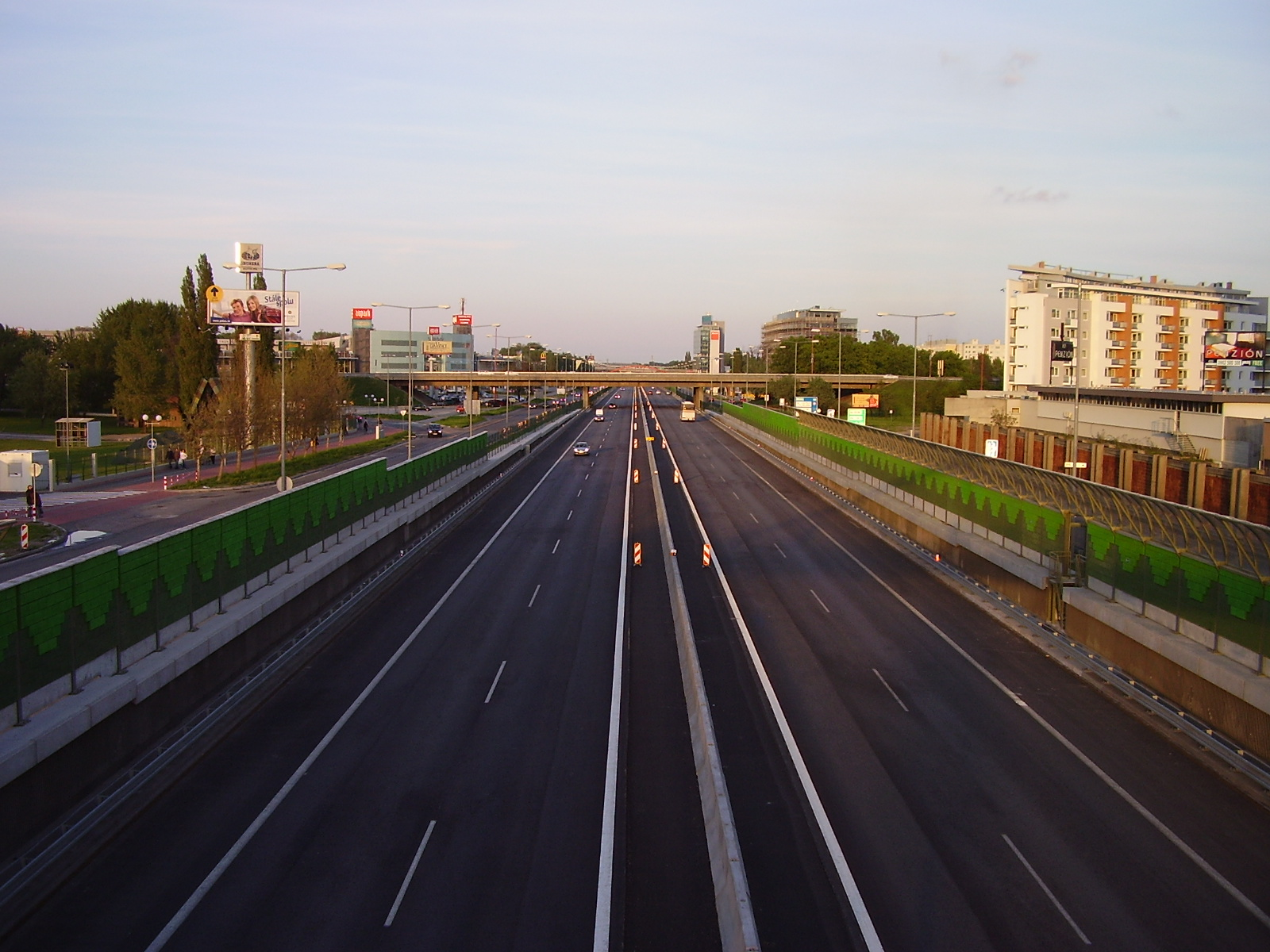 Einsteinova street, Bratislava, Slovakia